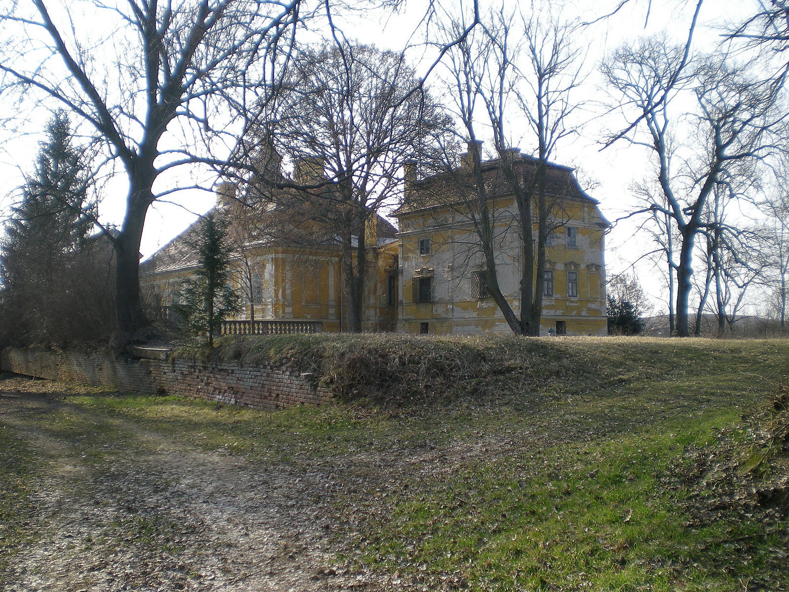 v. Prónay-kastély (Acsa, Petőfi u.) This is a photo of a monument in Hungary, Identifier: 6879